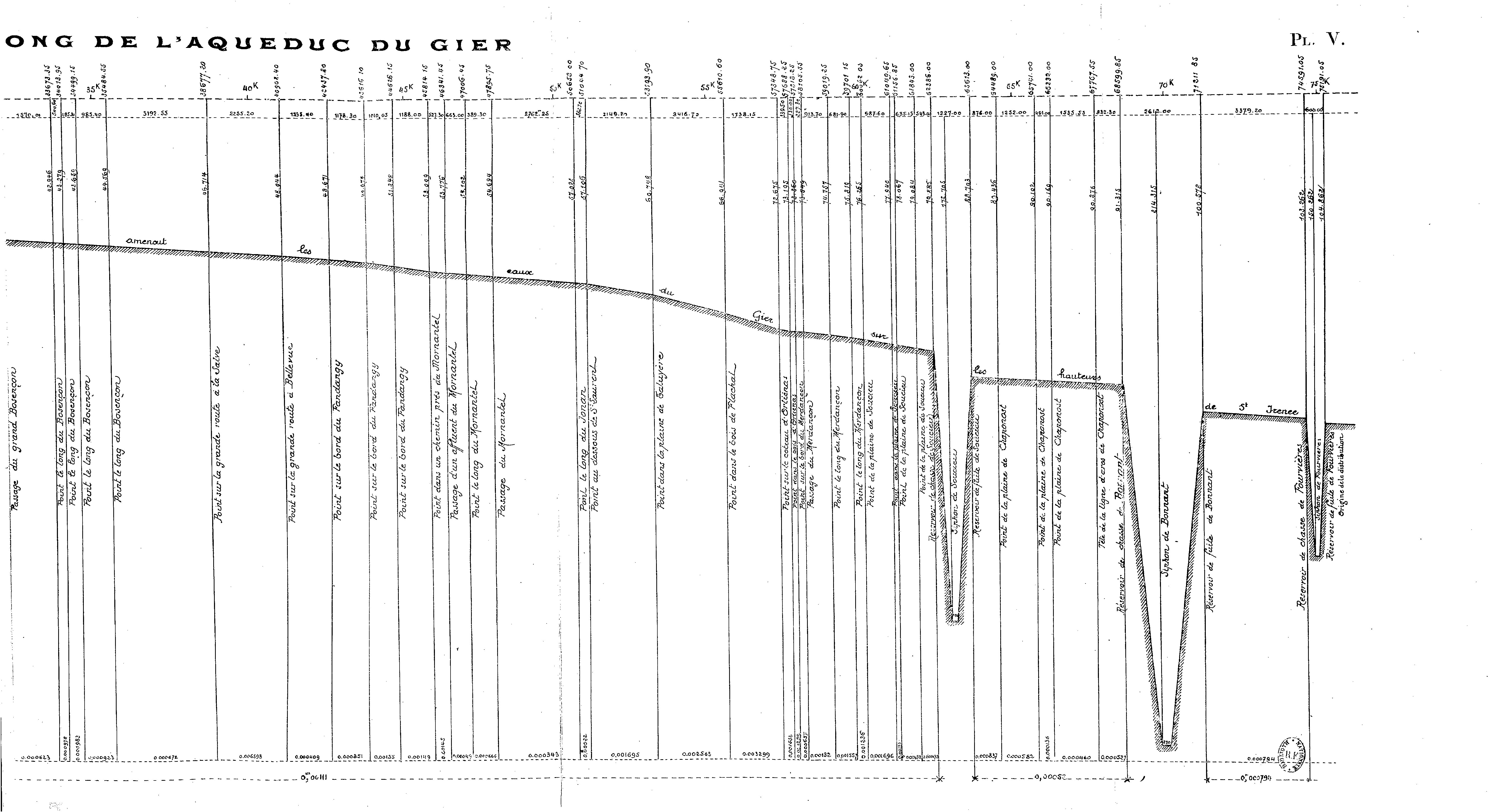 Les aqueducs antiques de Lyon : étude comparée d'archéologie romaine : thèse présentée à la Faculté des lettres de l'Université de Paris / par C. Germain de Montauzan.